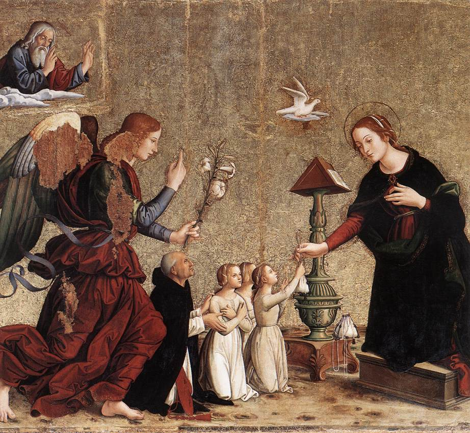 with Devotees